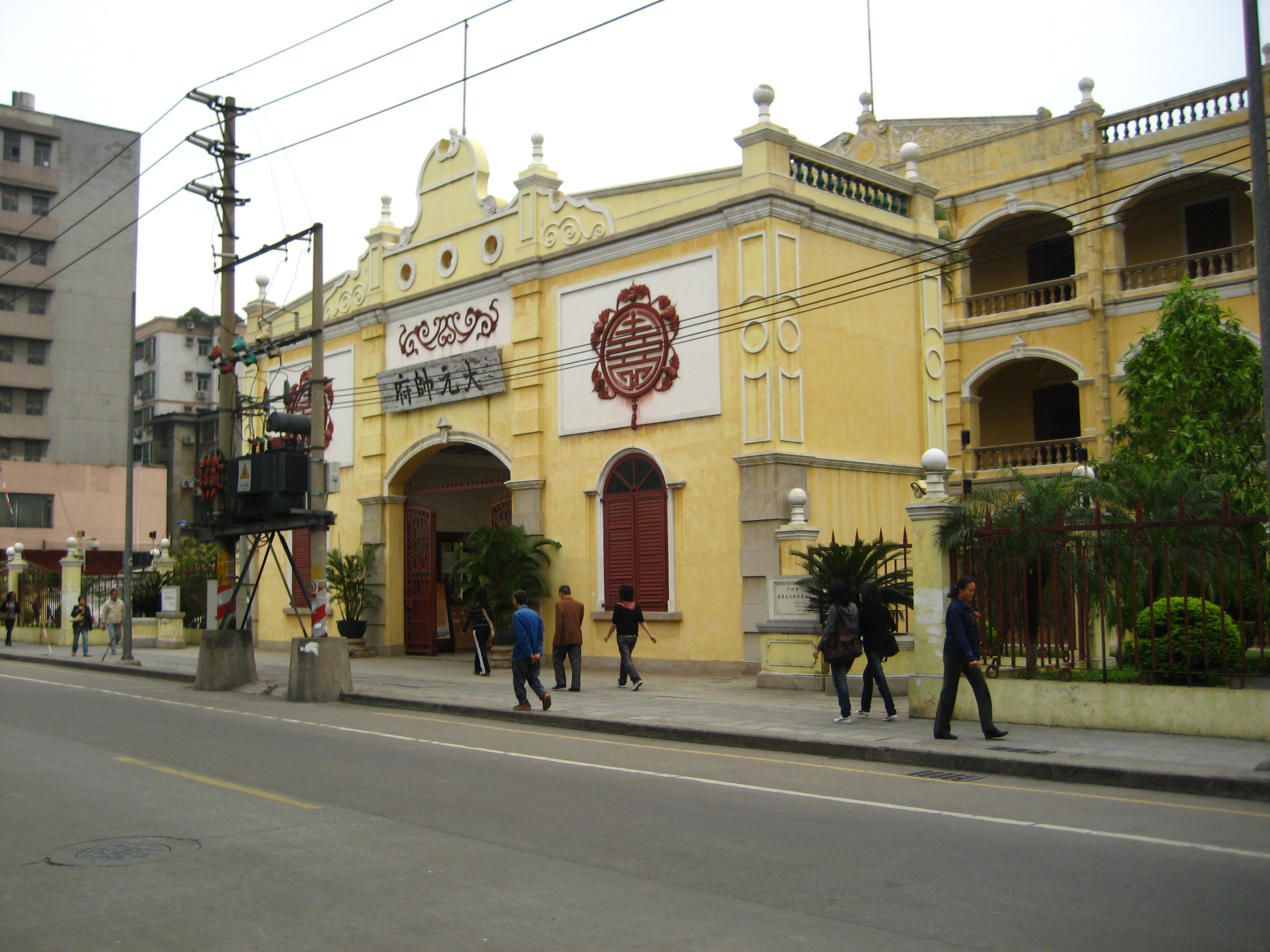 孫中山大元帥府紀念館